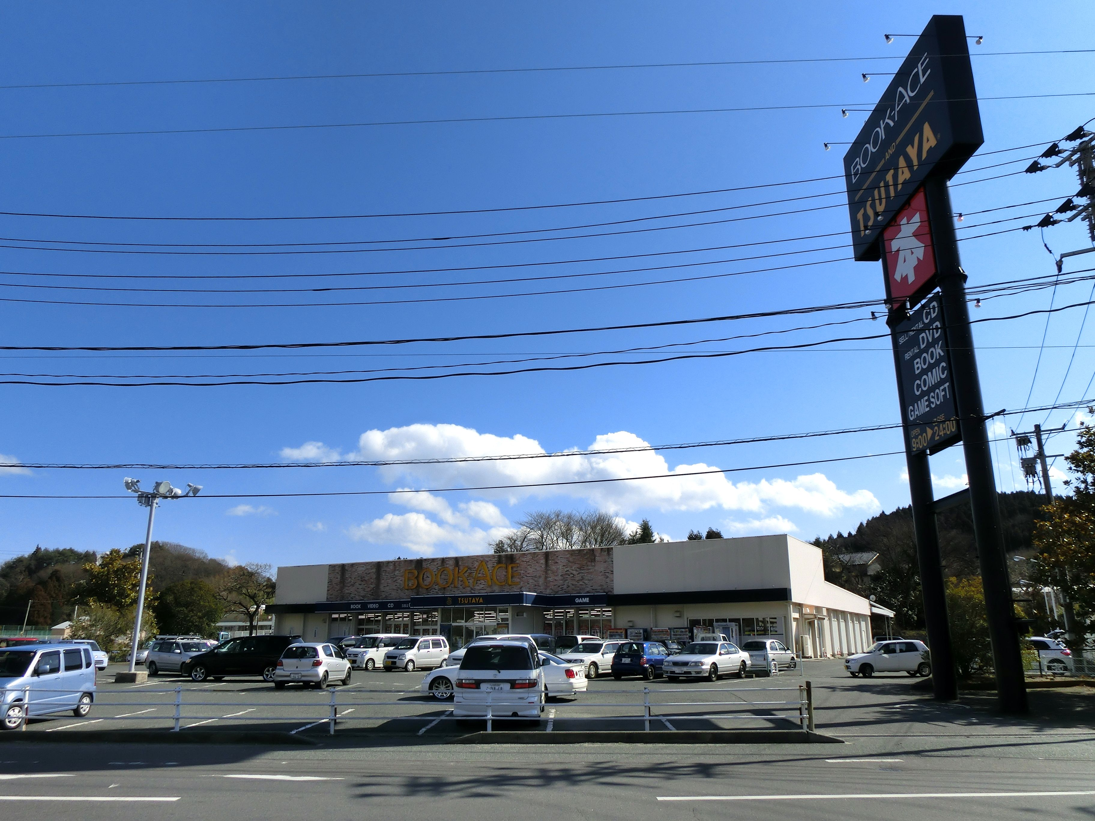 ブックエース上荒川店